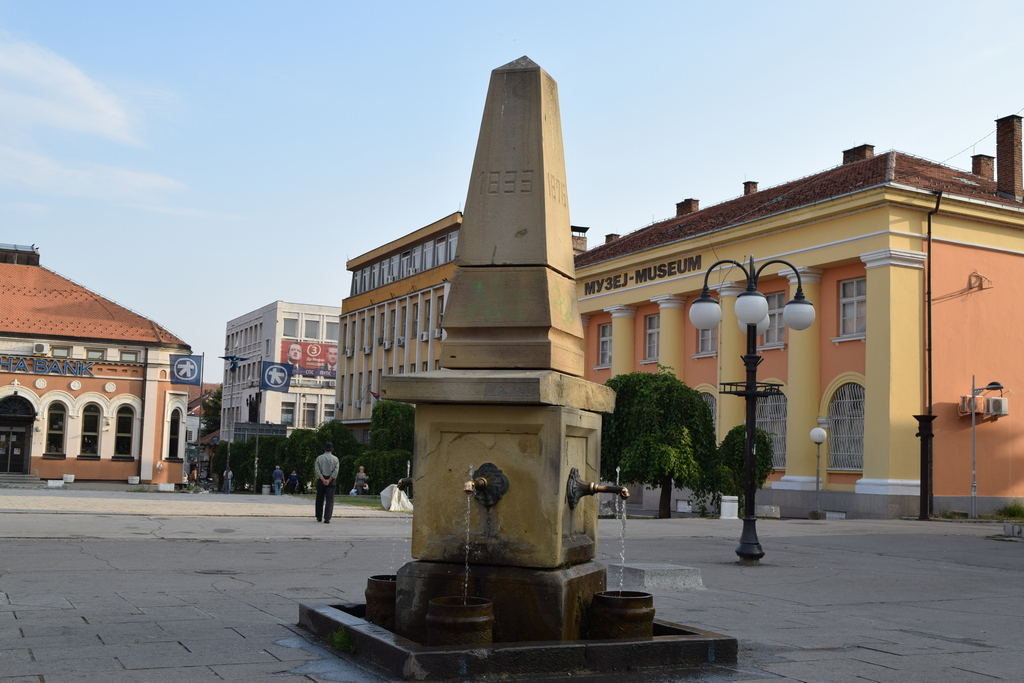 Музеј